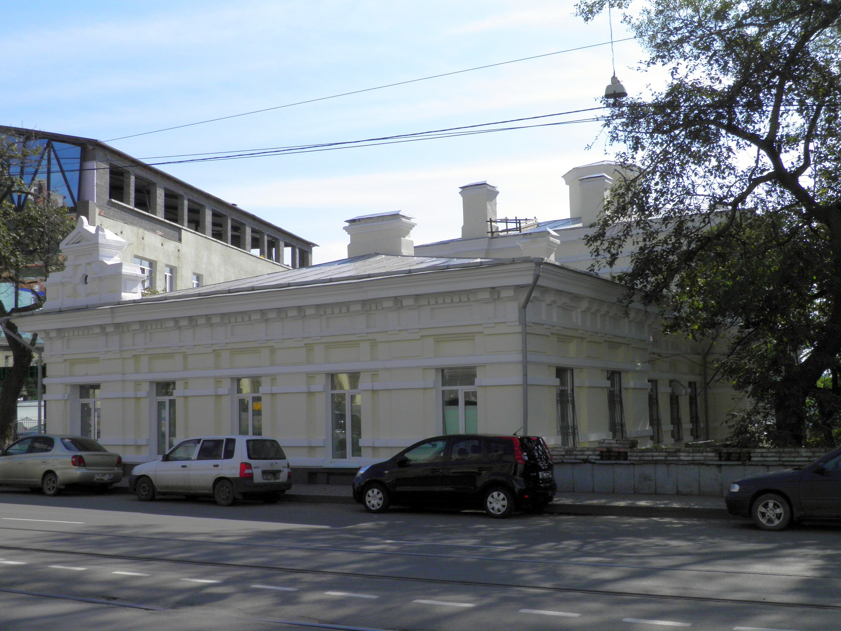 Бывший дом командира портов Восточного океана. Построен в 1914-1917 г. Адрес г. Владивосток улица Светланская дом 80-А (вид со Светланской) - памятник архитектуры